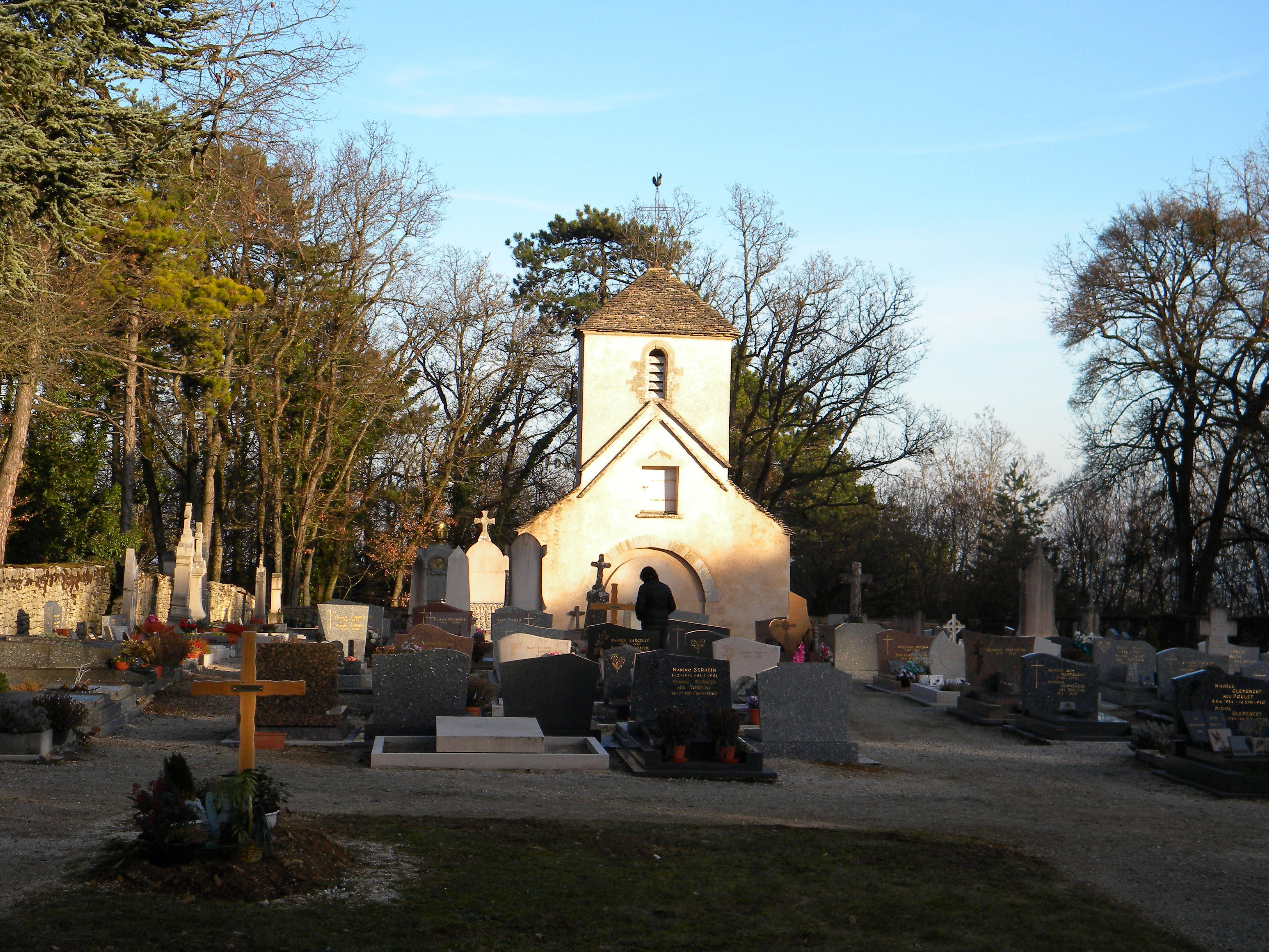 Chapelle du Mont et chapelle de Villers-la-Faye